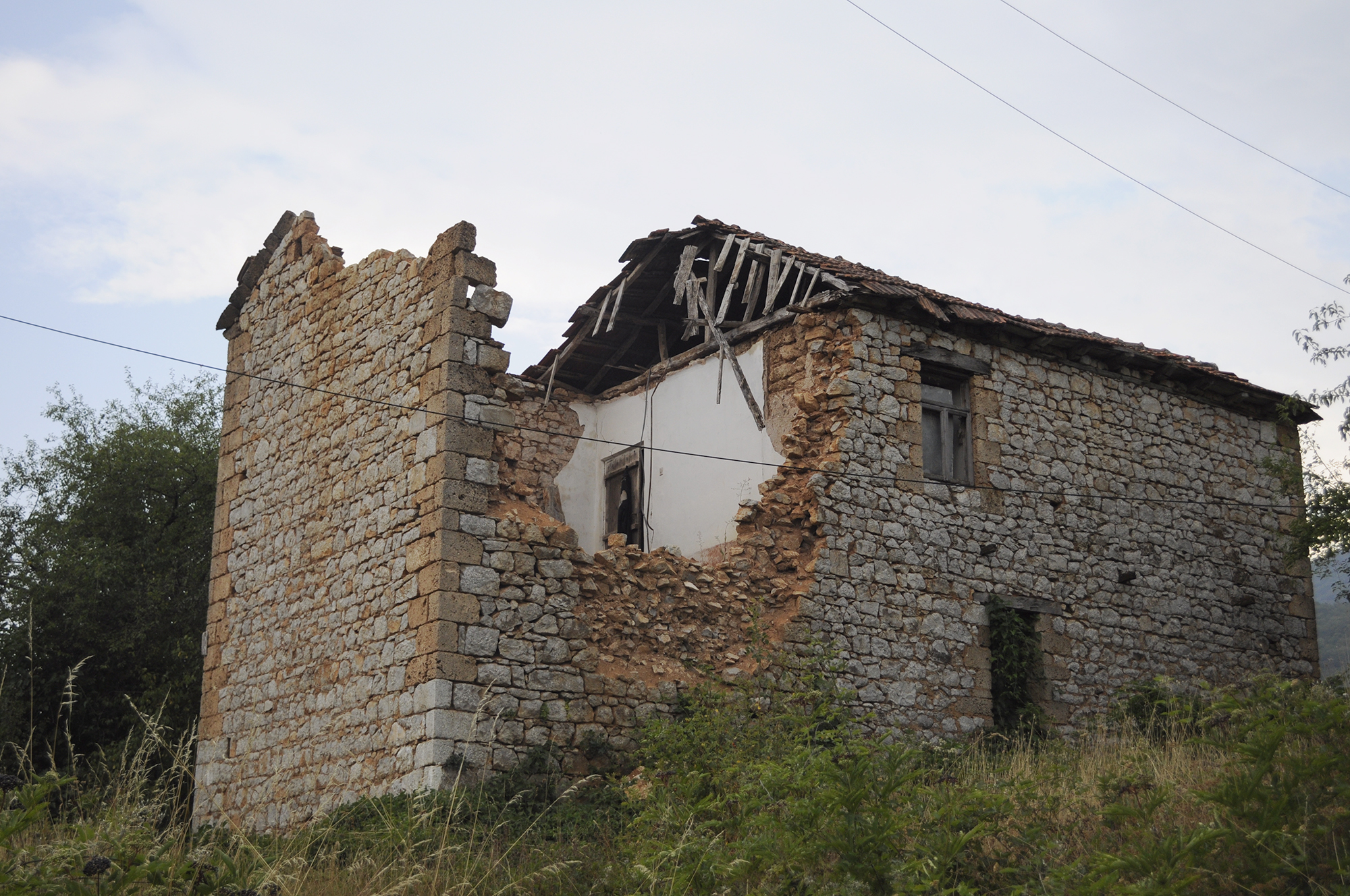 Оштетена куќа во Вишни